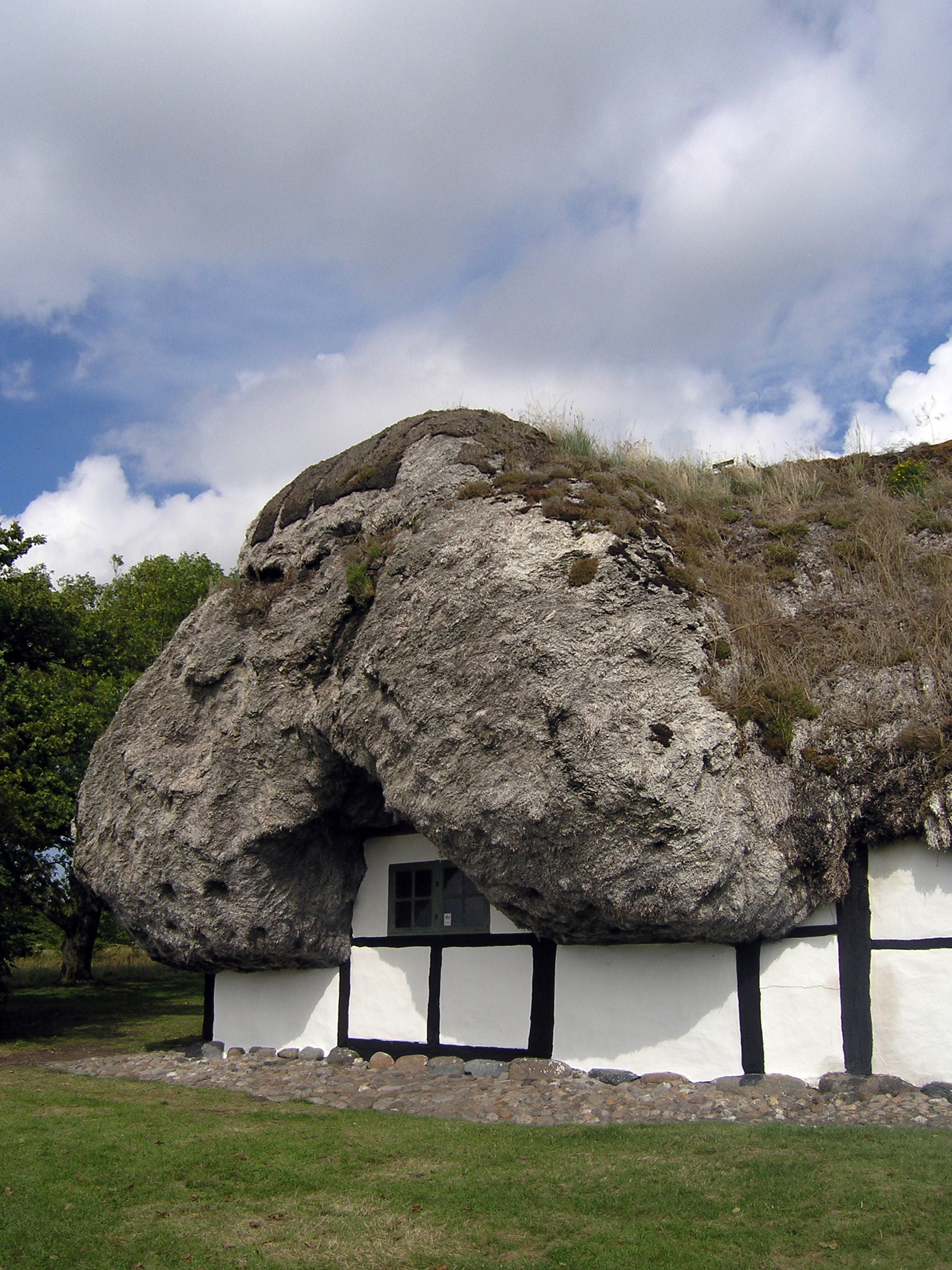 Læsø house at Frilandsmuseet north of Copenhagen, Denmark